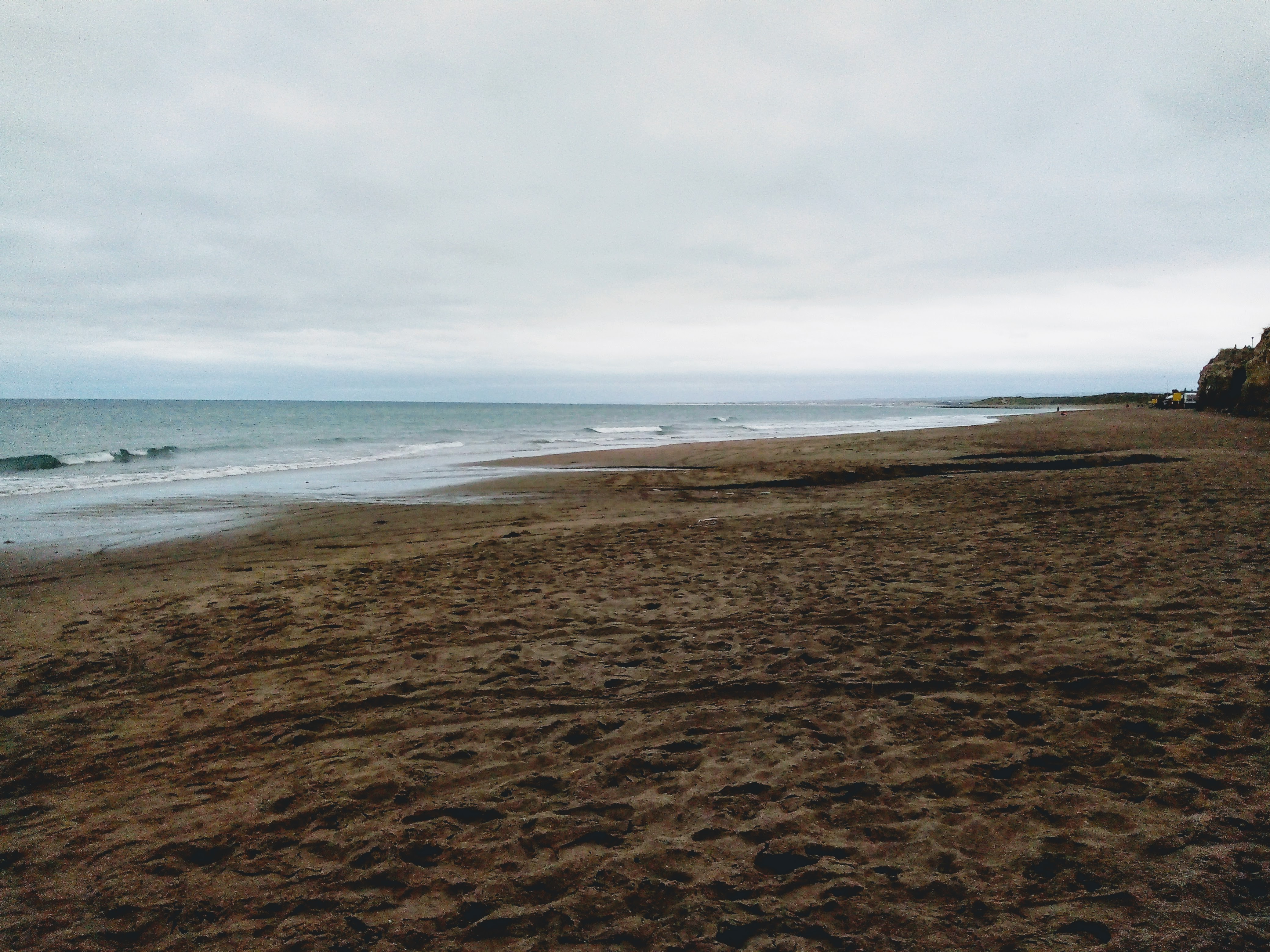 Playa Las Grutas - Bajada 1 año 2019